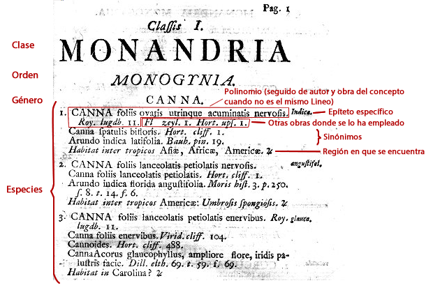 Species Plantarum - primera página del contenido, con etiquetas.